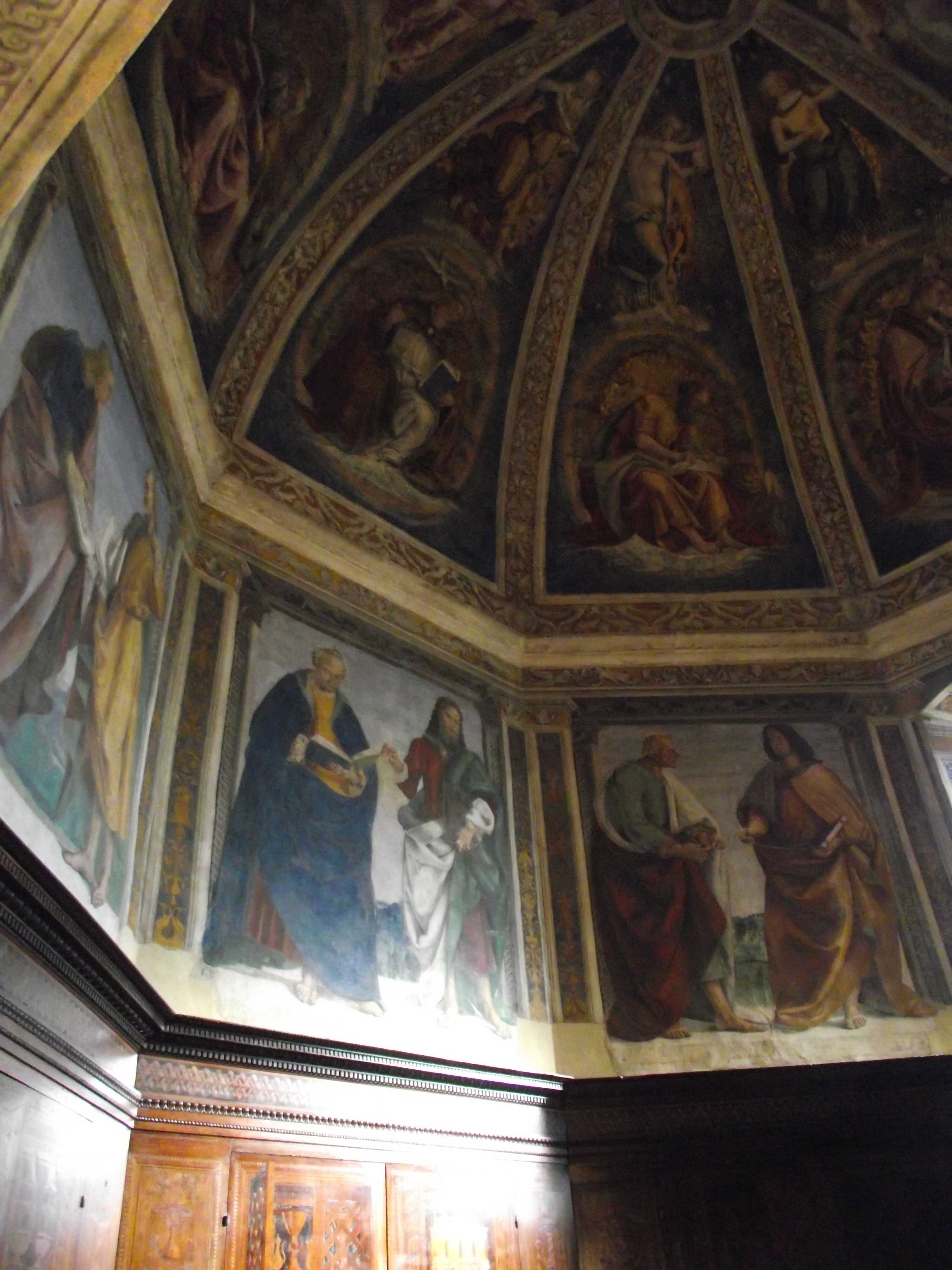 Loreto, Basilica della Santa Casa, Sacrestia di S. Giovanni